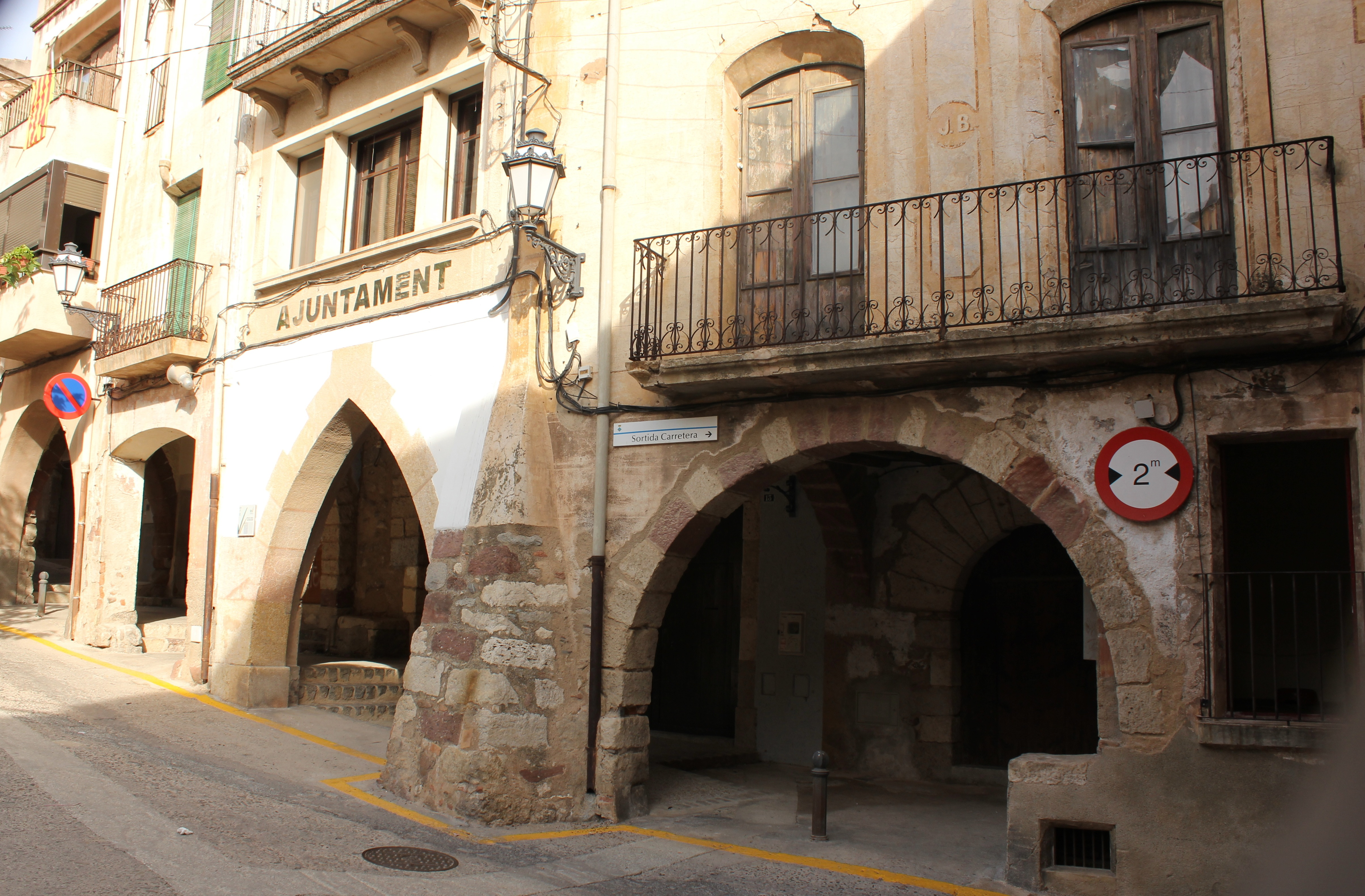 Plaça porxada (Alforja)